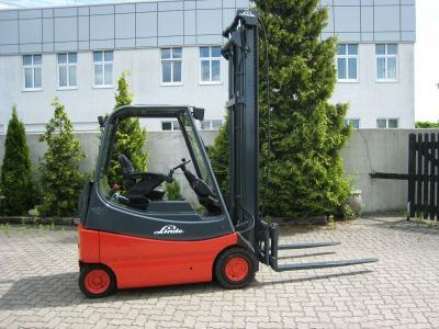 Linde E20-02 elektrischer Frontstapler mit Teilkabine und Seitenschieber, zweifachem Hubgerüst, Superelastikreifen, Baujahr: 2002, Hubhöhe: 5000mm, Eigengewicht: 4050kg, Gabellänge: 1400mm, Tragfähigkeit: 2000kg, Bauhöhe: 3100mm